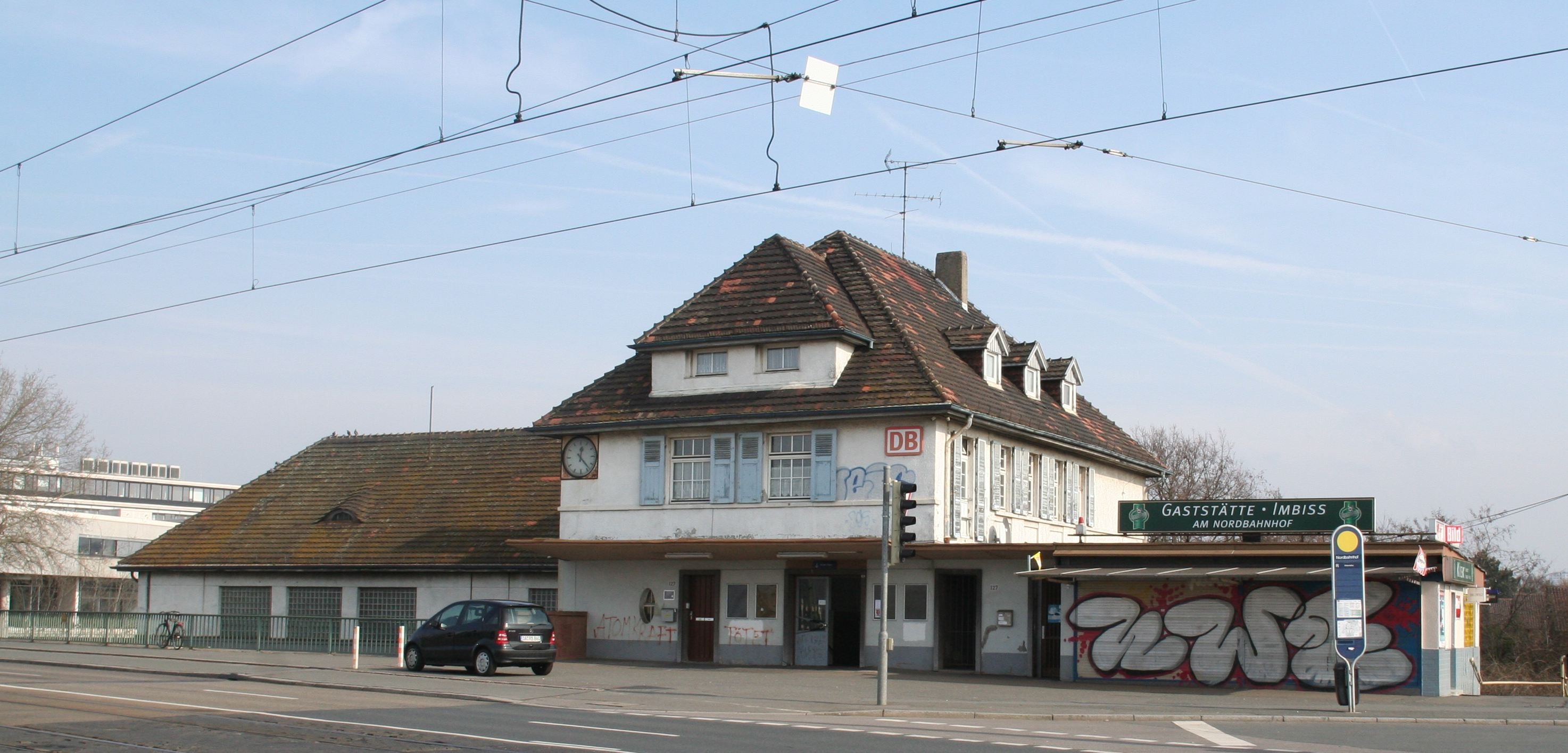 Empfangsgebäude Bahnhof Darmstadt Nord